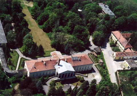 Hegyfalu, Hungary, aerialphotography